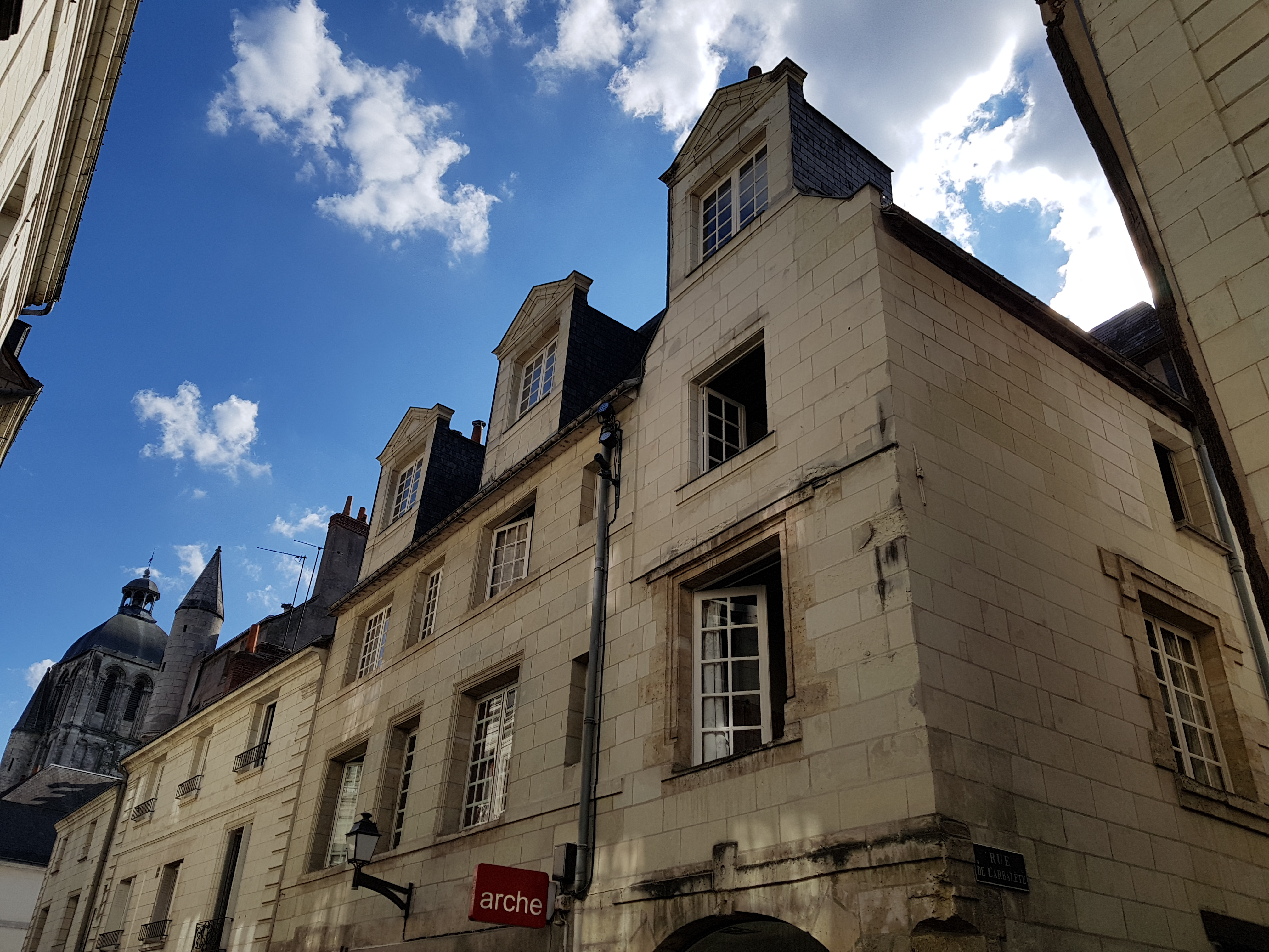 Vieux tours,11,13,15,17 rue du Change